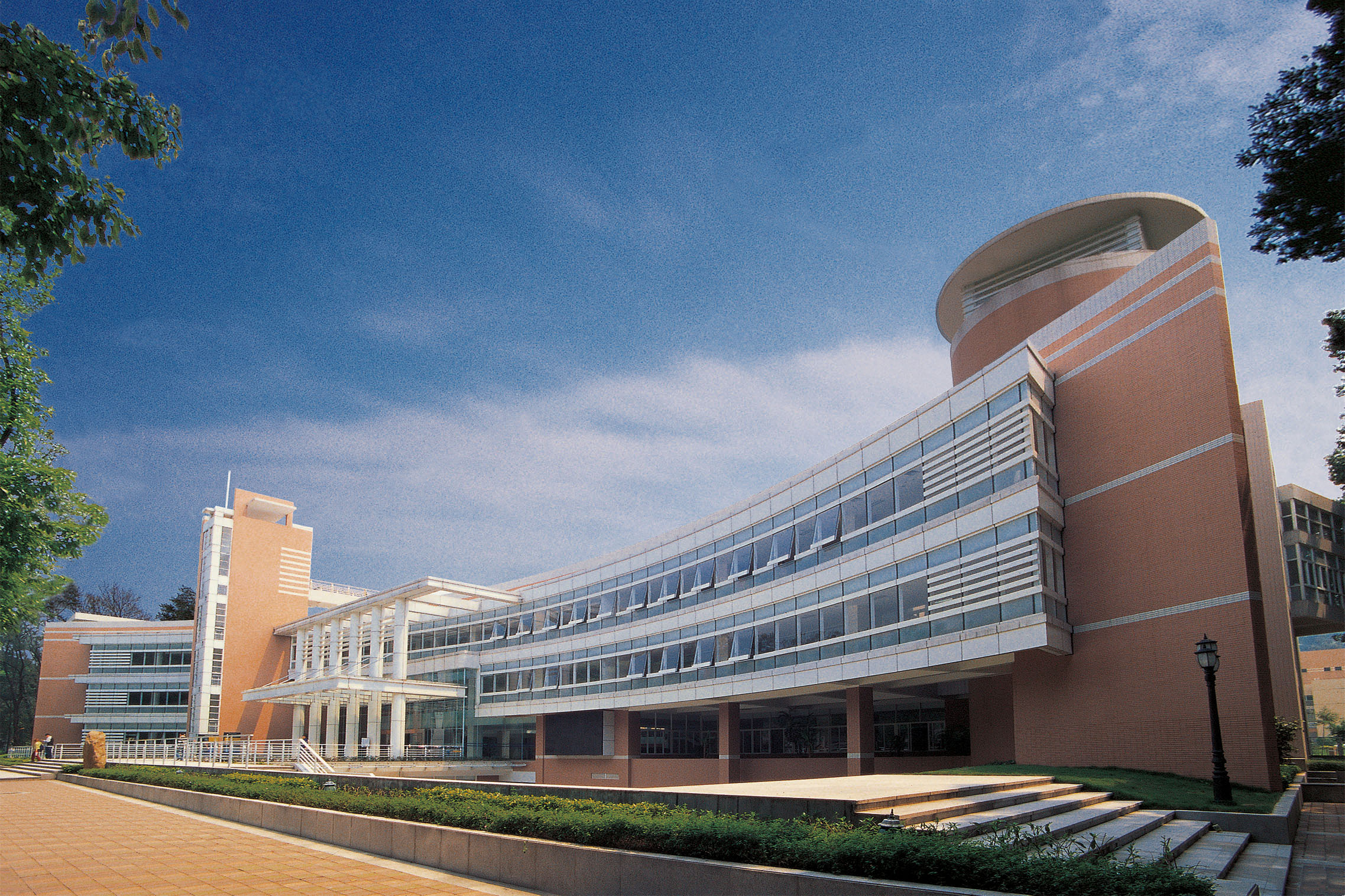 中文（中国大陆）: 广外图书馆